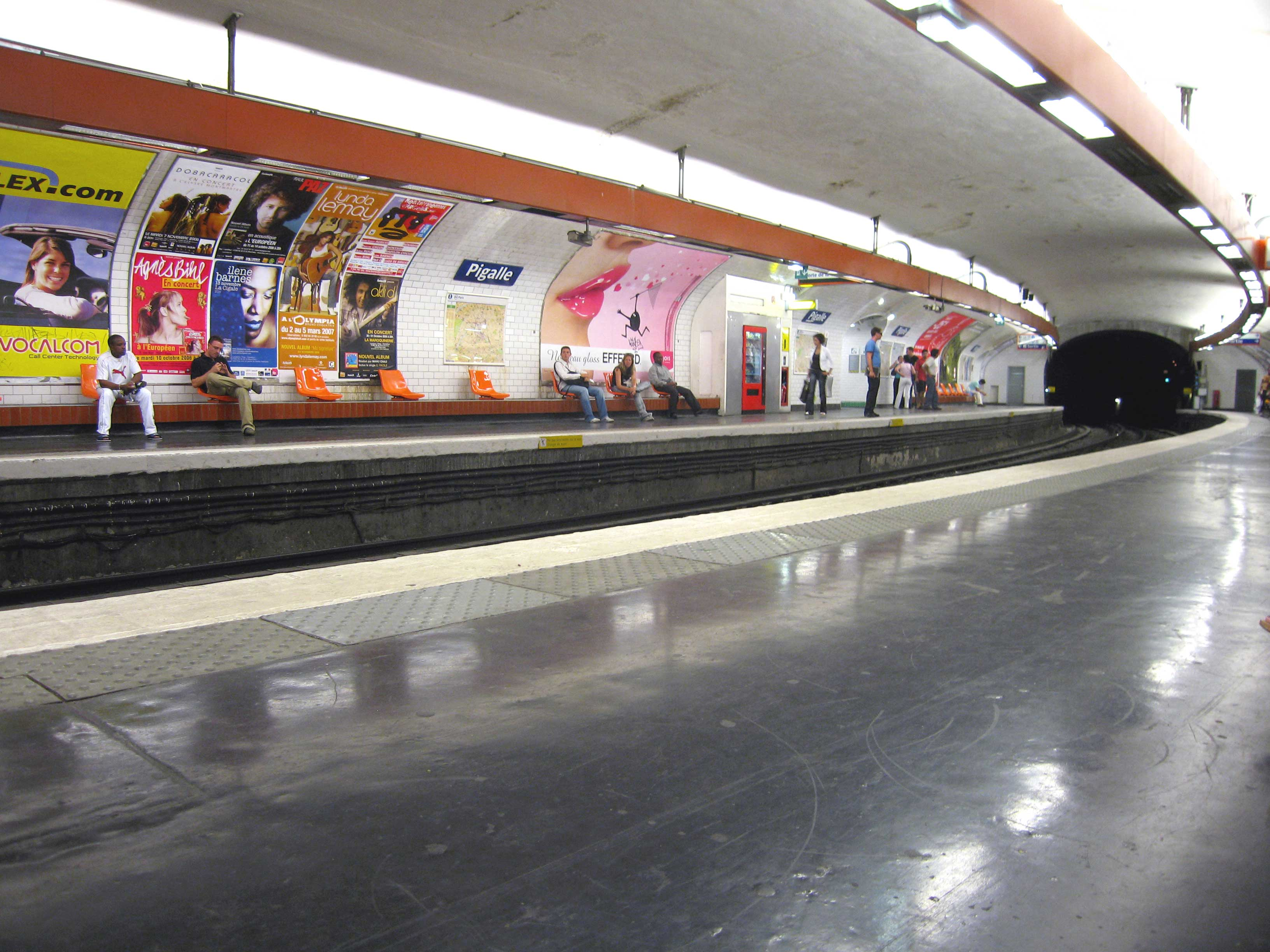 Description : Station Pigalle sur la ligne 12 du Métro Place : Paris, France Date : 2006 Author : Pline photo personnelle